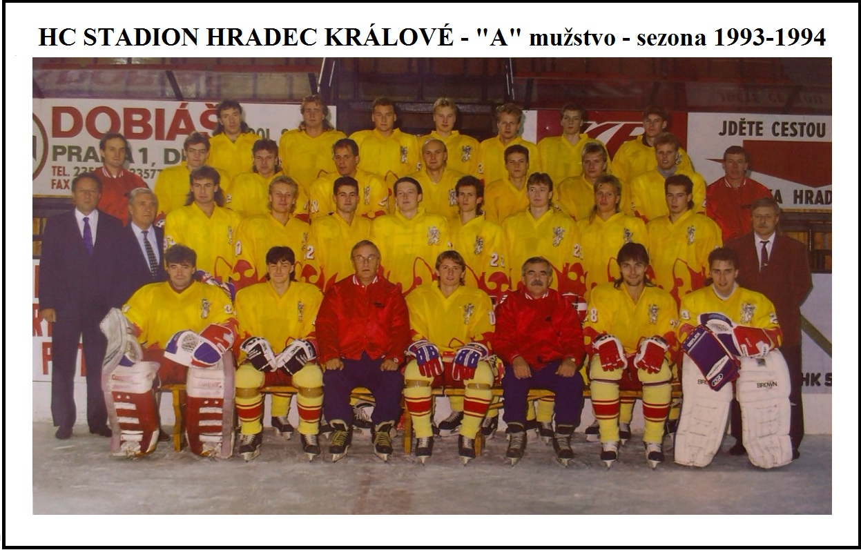 Stadion Hradec Králové - sezona 1993-94